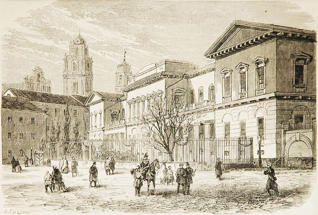 Беларуская (тарашкевіца): Вільня (Vilnia), пляц Палацавы (plac Pałacavy), палац біскупа Масальскага (Masalski)